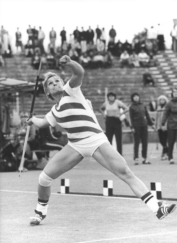 Ruth Fuchs ADN-ZB Thieme 11.08.1979-trs-Karl-Marx-Stadt: DDR-Meisterschaften in der Leichtathletik-Erwartungsgemäß sicherte sich Weltrekorderin Ruth Fuchs (SC Motor Jena) erneut die Meisterschaft im Speerwerfen und errang zugleich ihren 10. Titel seit 1967.Ihre sehr gute Weite von 66,50 m erzielte sie in ihren letzten Versuch.